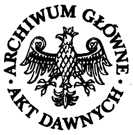 Logo of Archiwum Główne Akt Dawnych